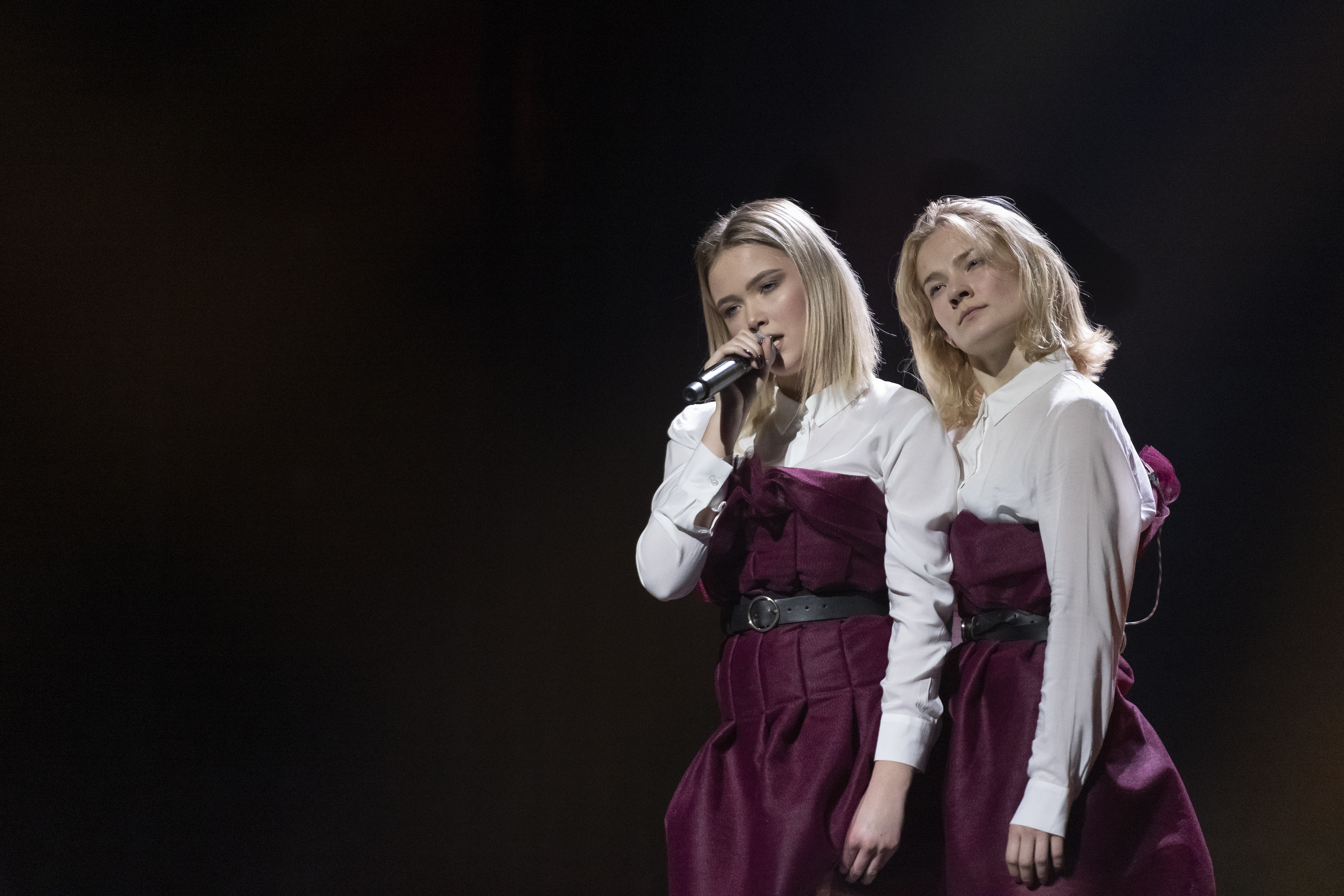 Malou Prytz Melodifestivalen 2020 Linköping repetition